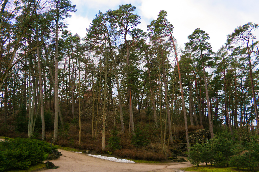 Birutė Hill in Palanga